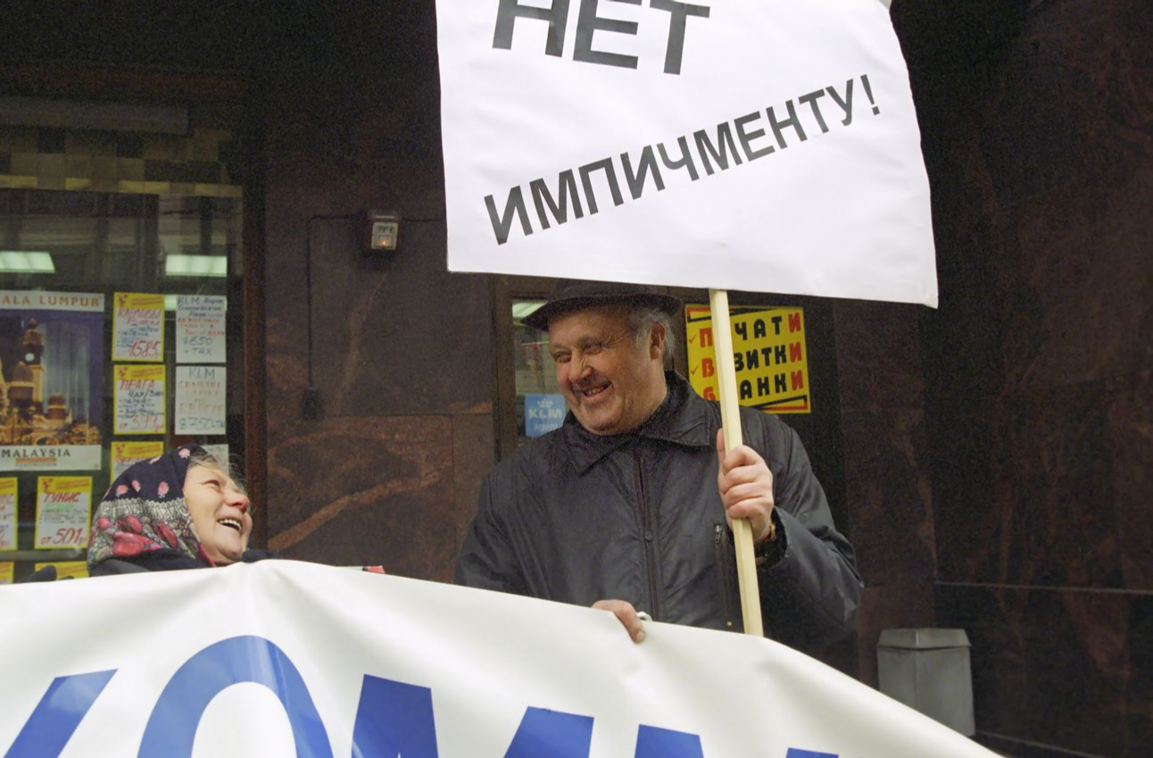 Пикет у здания Государственной Думы во время рассмотрения на пленарном заседании вопроса об импичменте Президенту России Б.Н.Ельцину. 15 мая 1999г. фото В.Ф.Федоренко